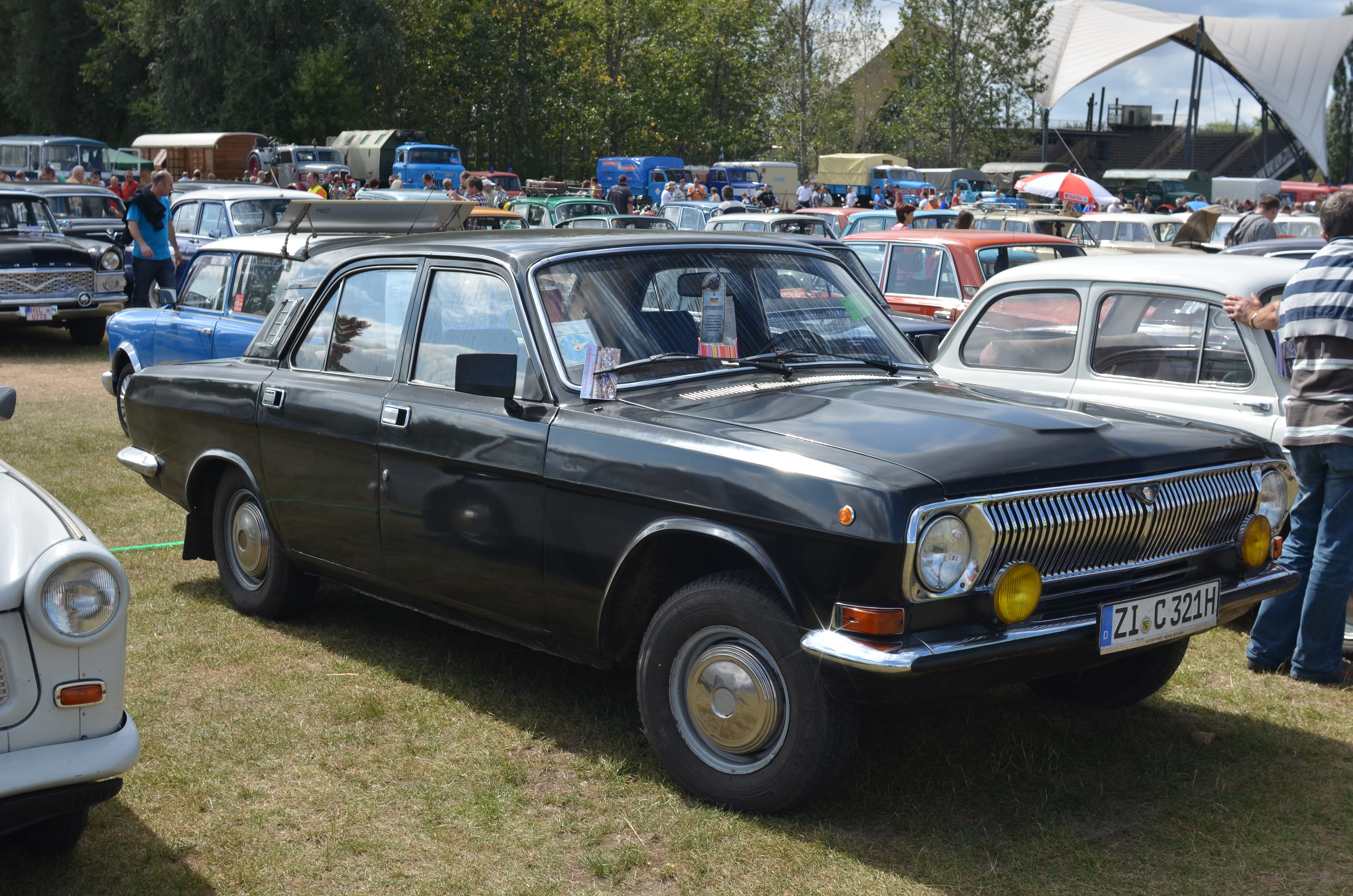 Wolga